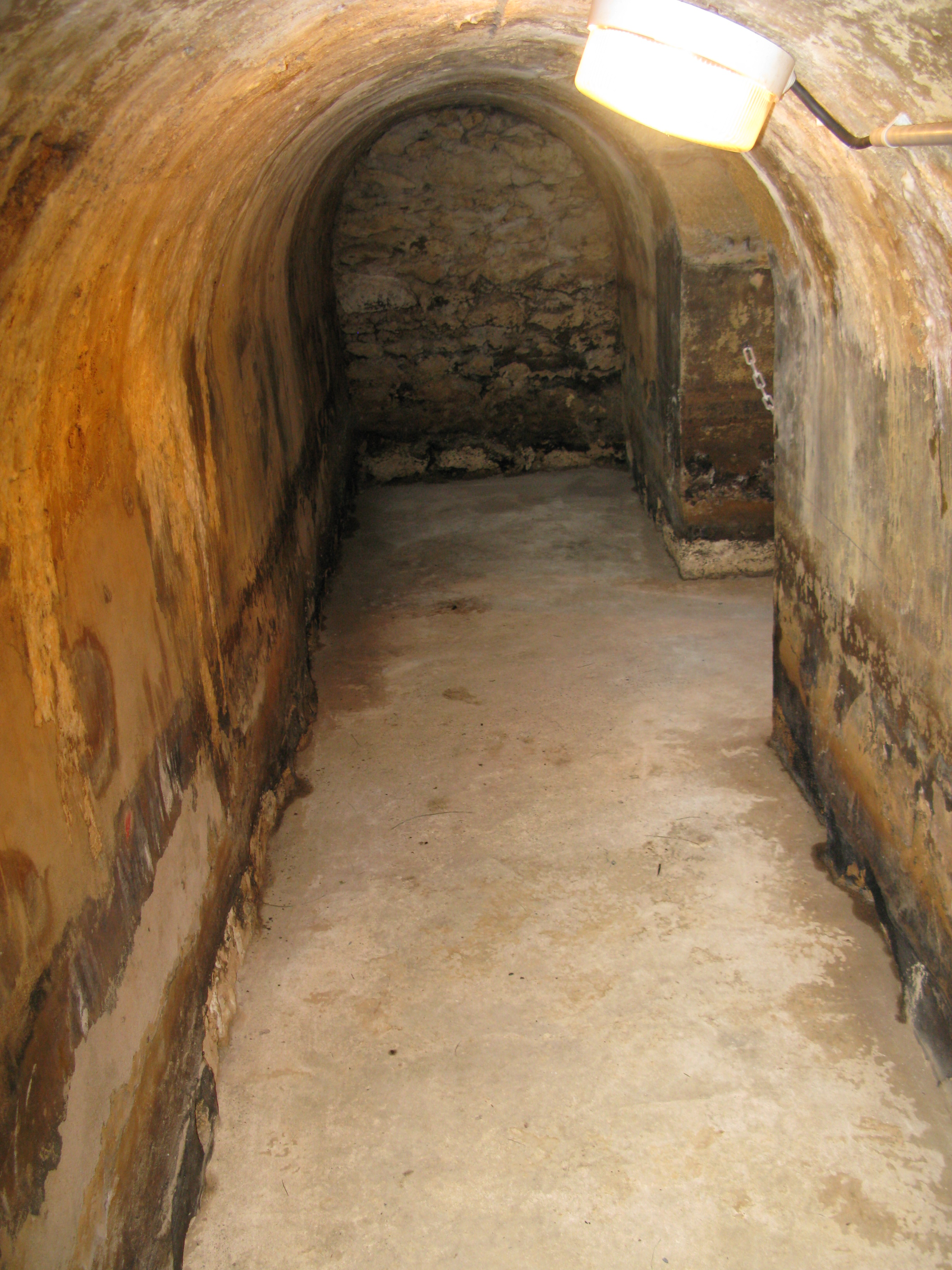 Intérieur de l'aqueduc du Thil, sous le regard 21, à Saint-Médard-en-Jalles.